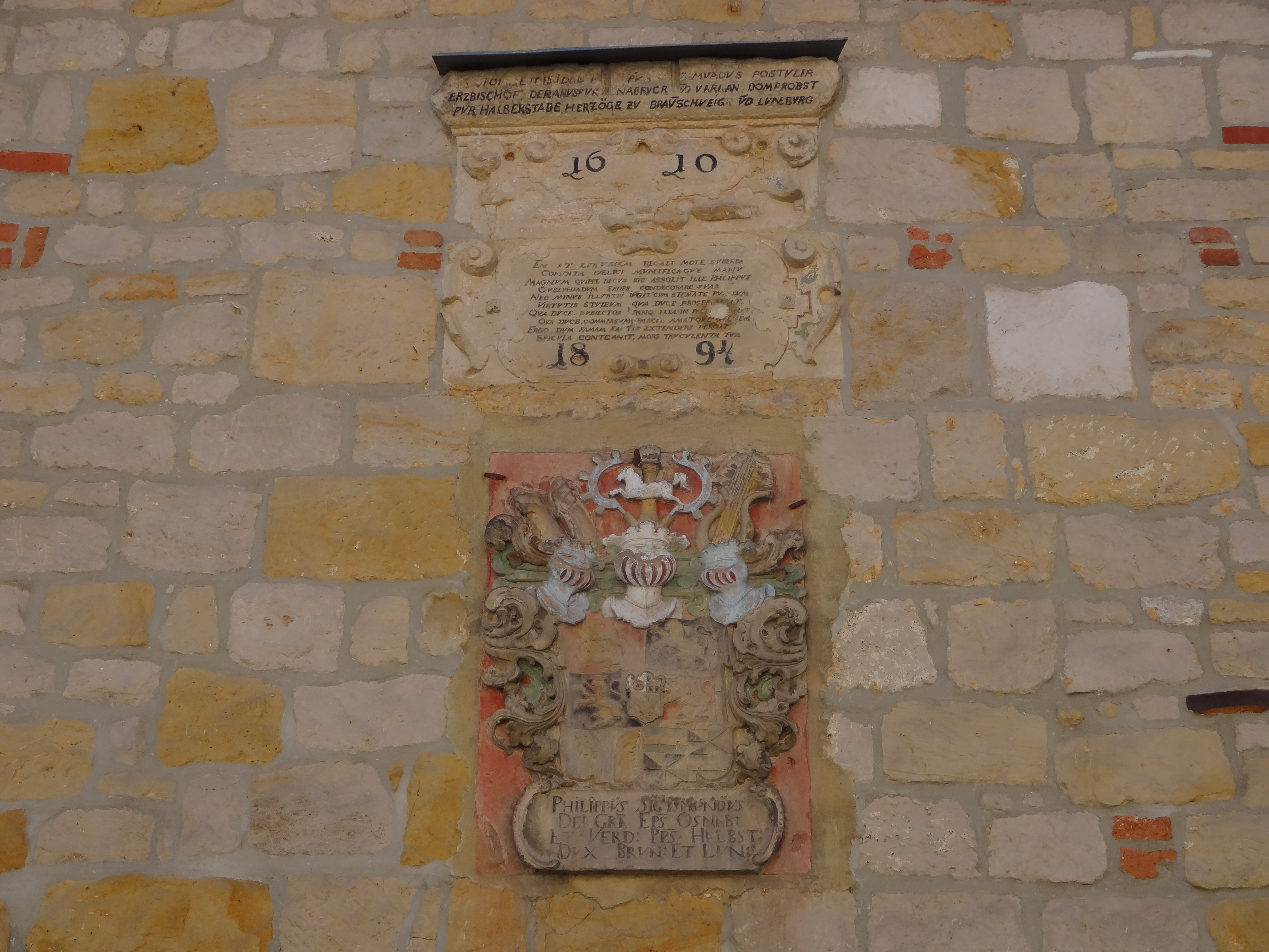 denkmalgeschützte Inschrift in der Mauer von Amtsstraße 7 in Harsleben